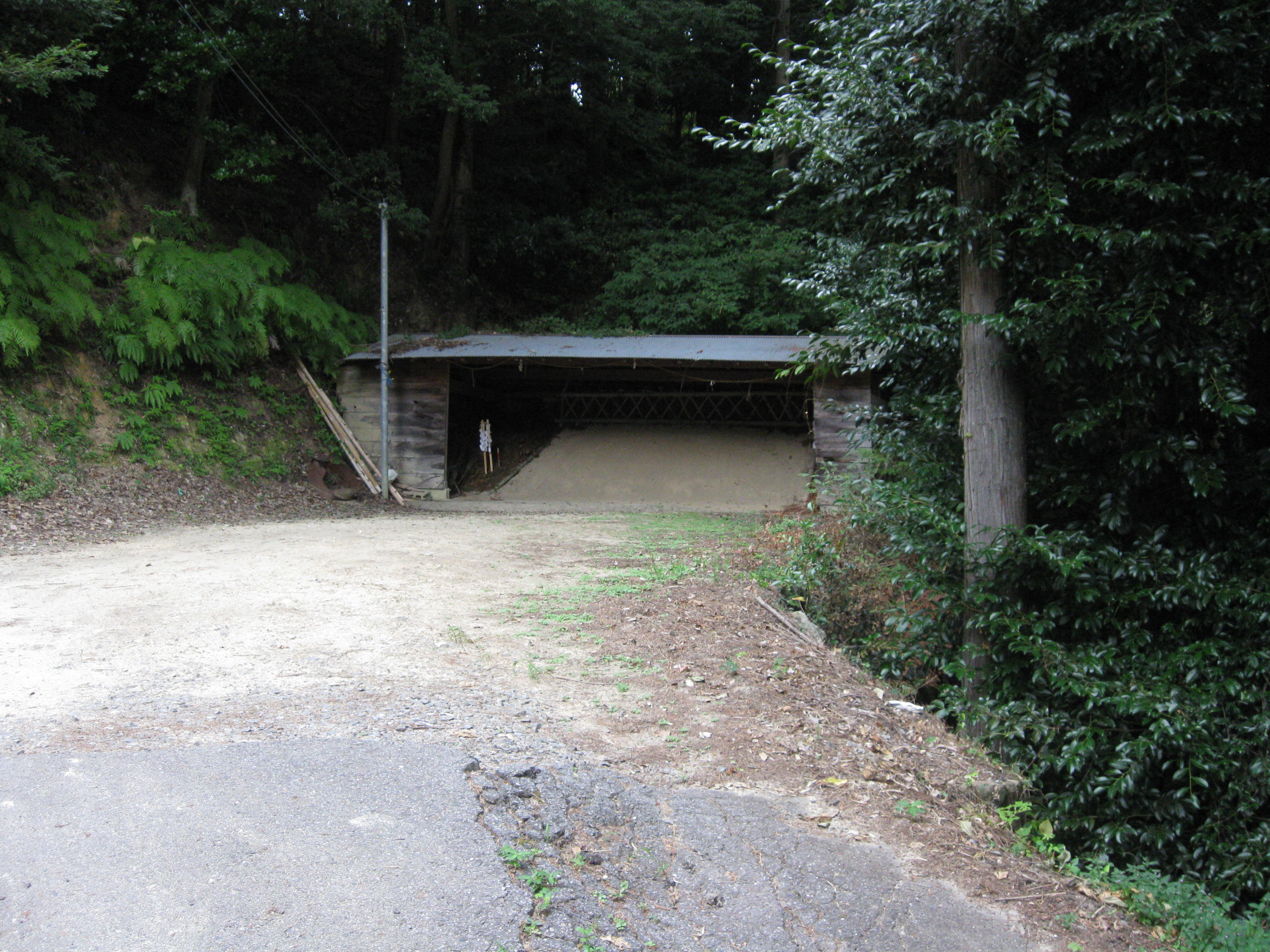 桜形神社弓道場